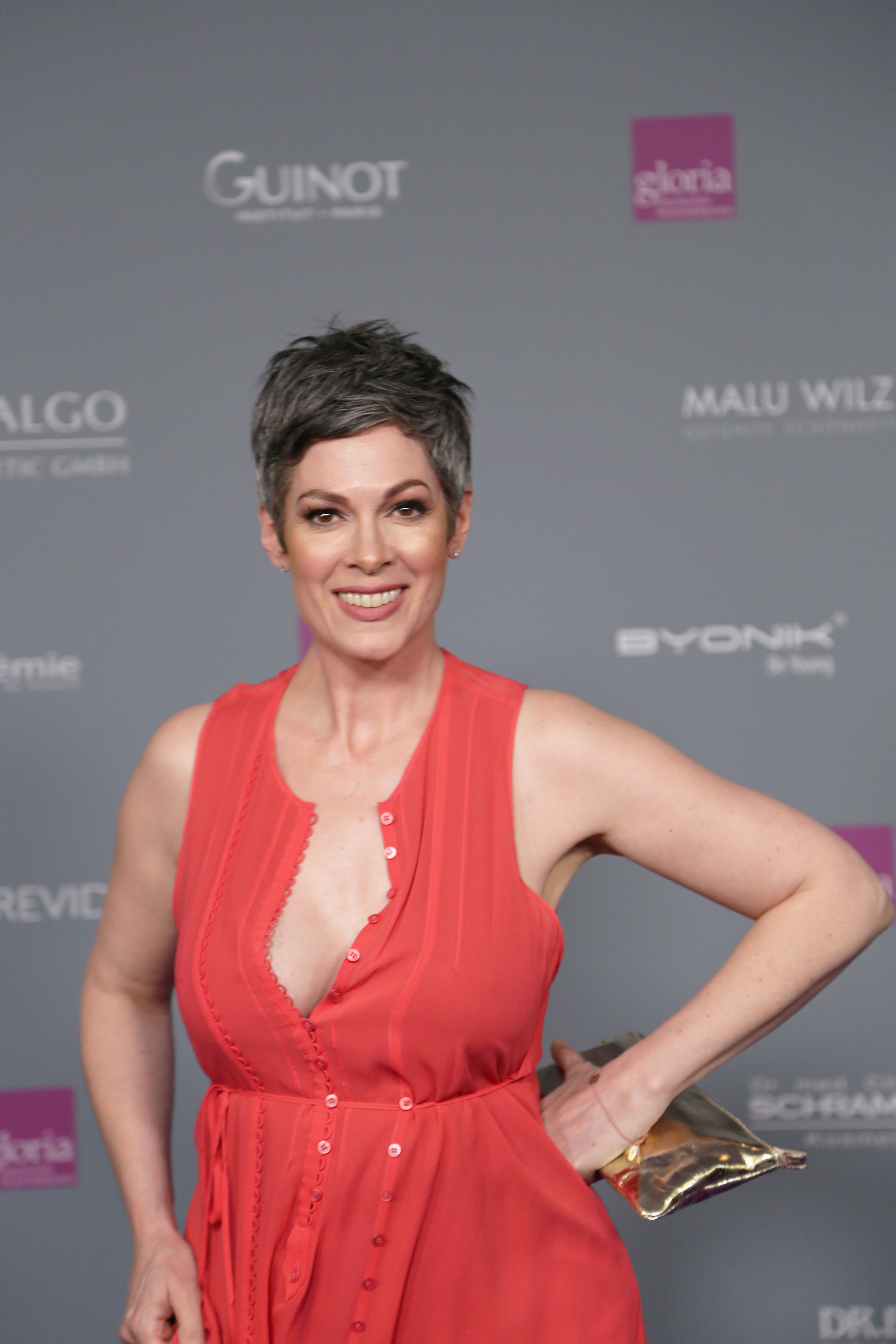 Cheryl Shepard beim "Gloria – Deutscher Kosmetikpreis" am 31. März 2017 im Hilton Hotel Düsseldorf.